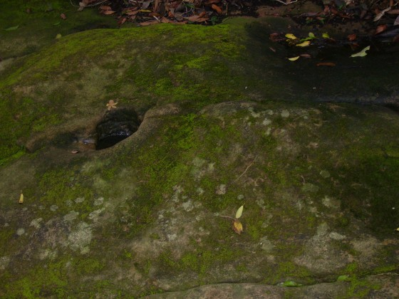 chisun,Taipei 芝山岩 2006.02